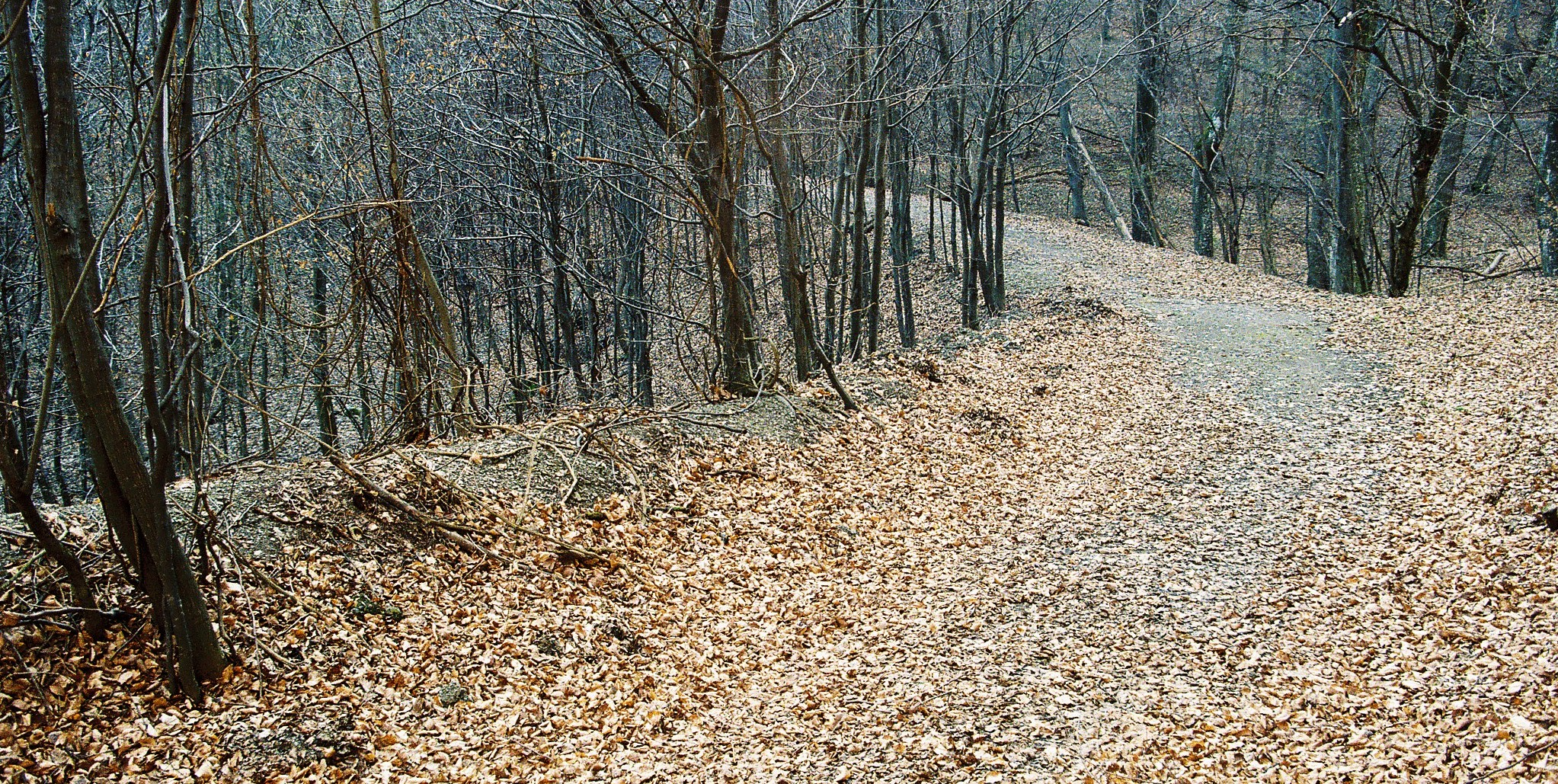 Erddamm der Szalajkabahn im Kukucsó-Tal in Ungarn